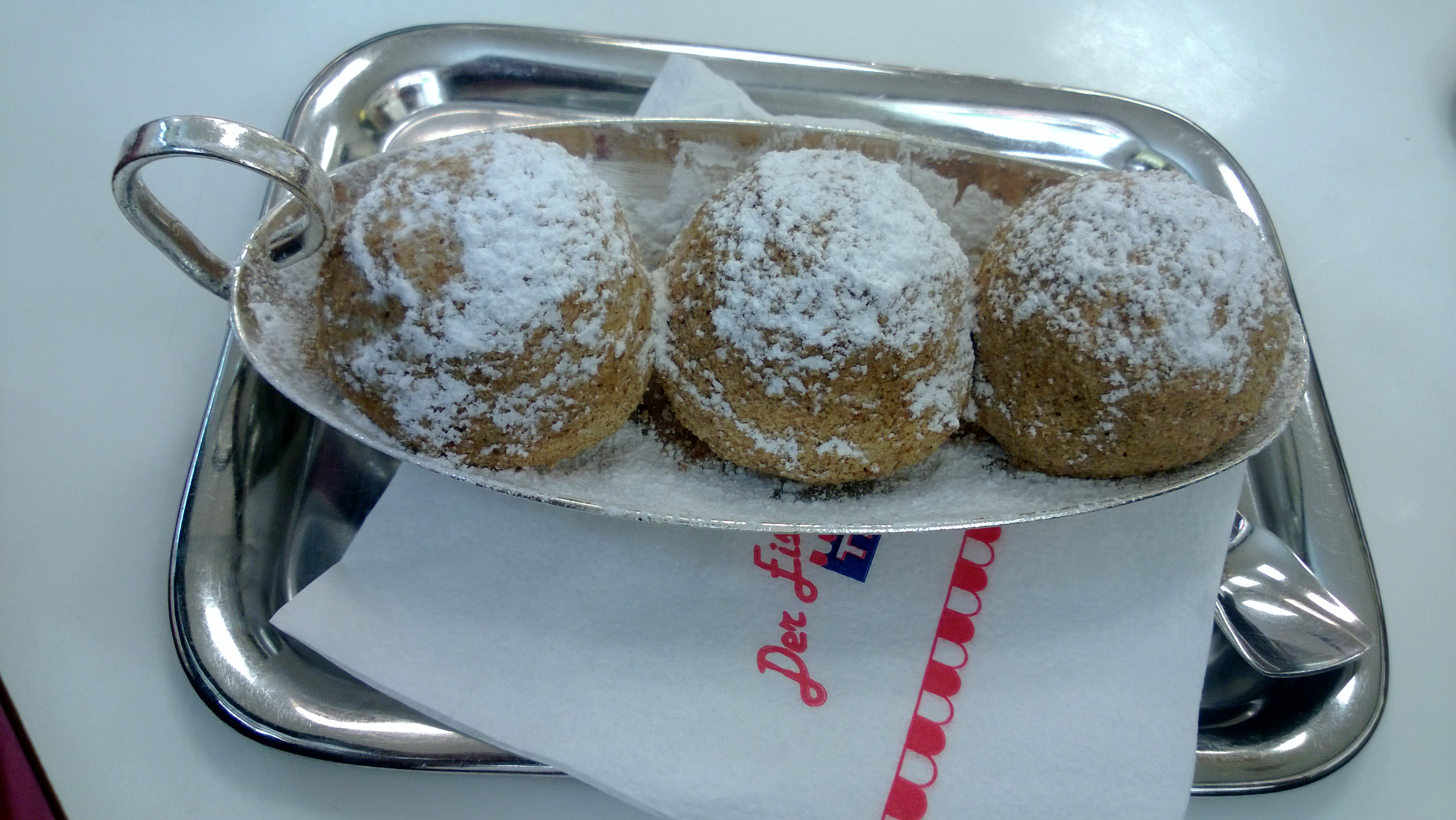 Eismarillen-Knödel - Tichy. In Favoriten, Vienna.